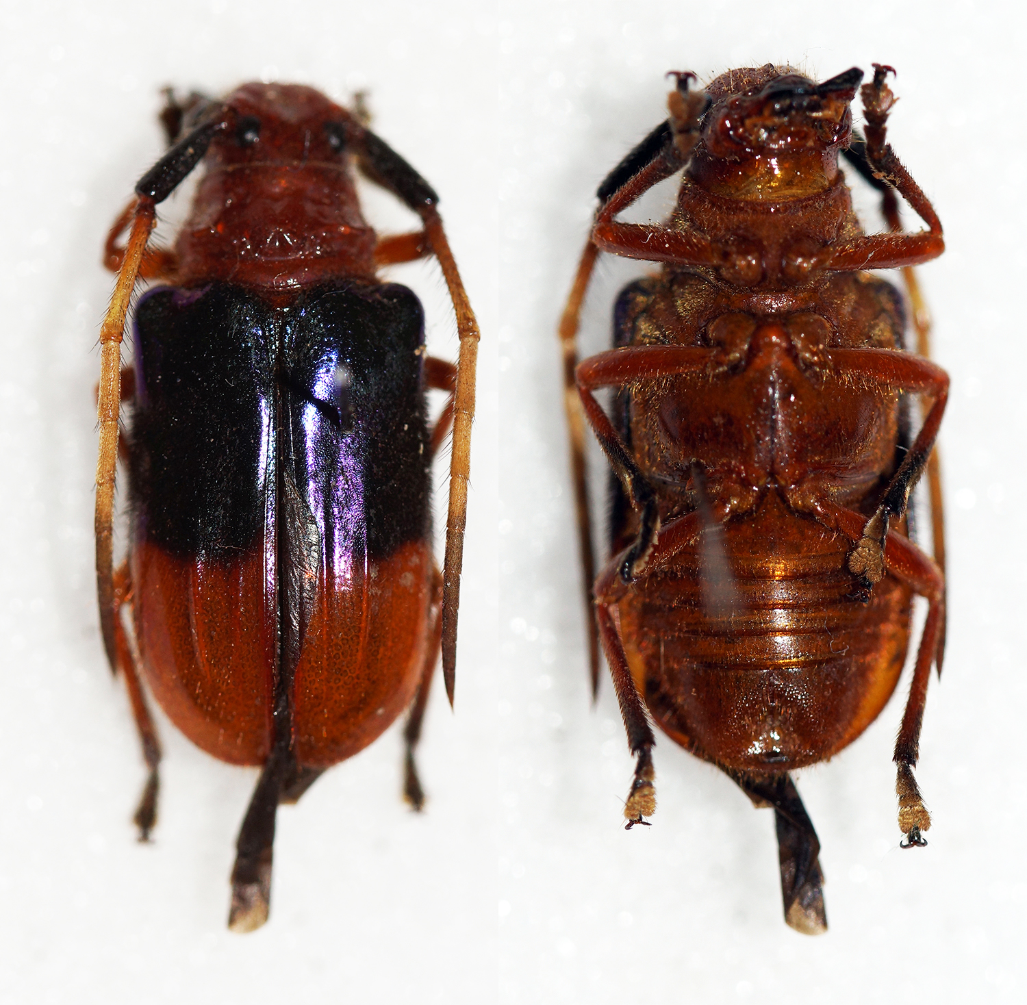 Newman,1842 Sex: Male Data: 05-2012 - Surigao - Mindanao - Philippines Size: 16mm